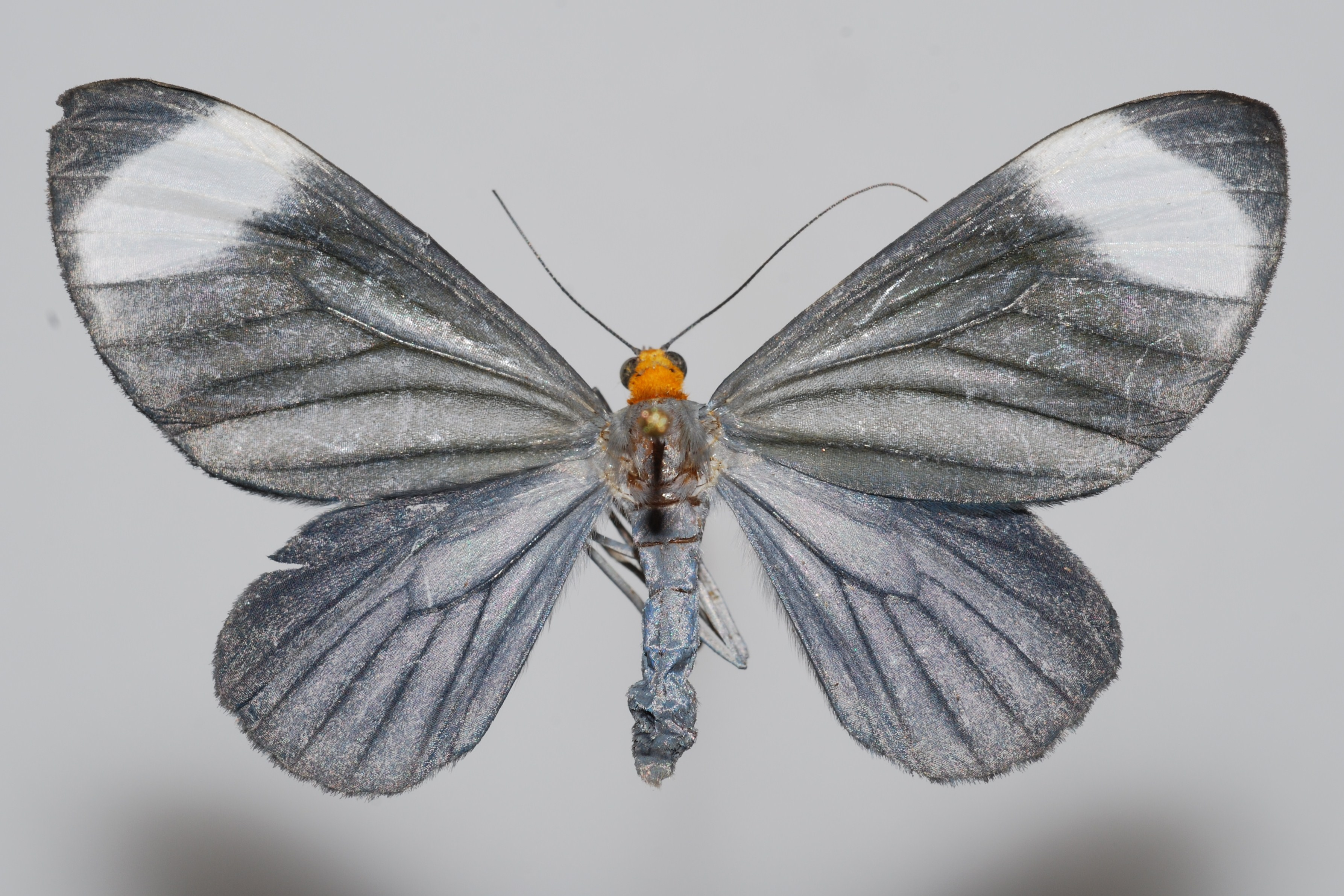 AC69, Geometridae, Ennominae, Simena luctifera, female